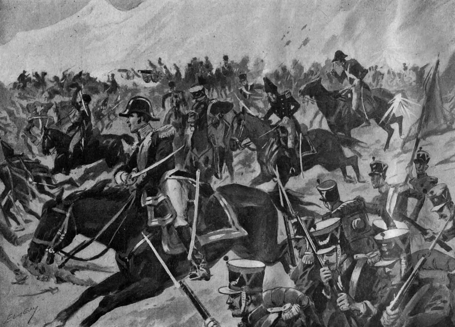 Tropas chilenas y argentinas rumbo a la Batalla de Chacabuco (12 de febrero de 1817), lideradas por José de San Martín.